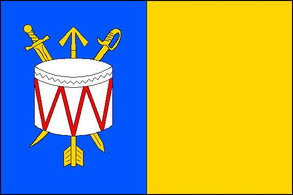 Vlajka obce Valšov